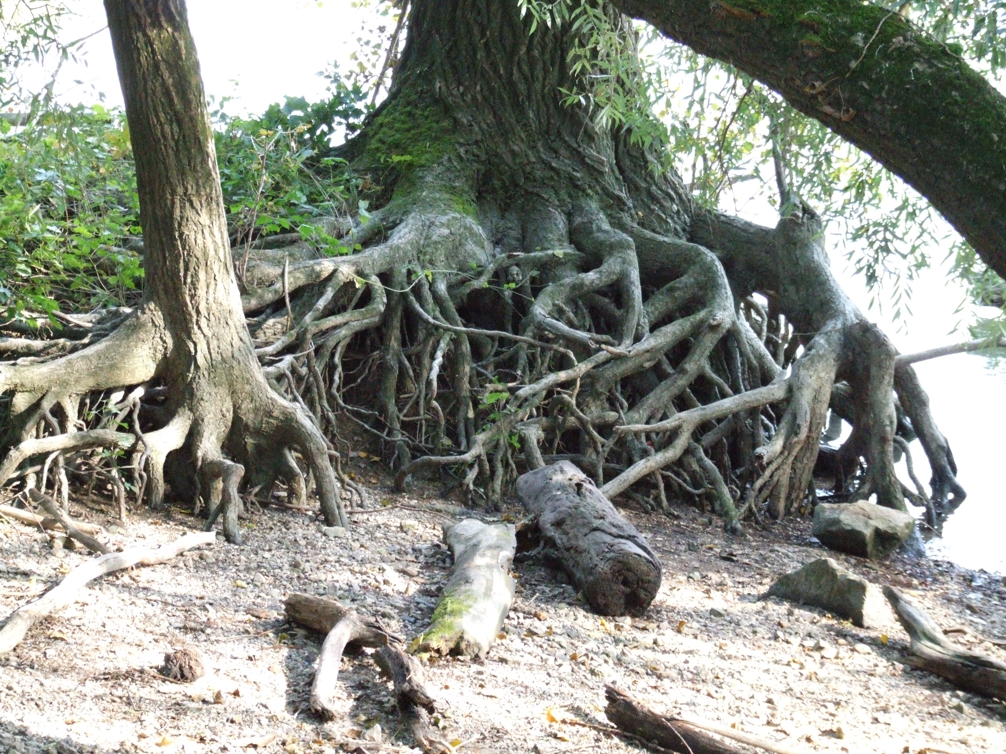 Wurzeln am Berghäuser Altrhein, Speyerer Auwald. Charakteristisch für den Auwald ist nicht nur der Wechsel von Überflutung und Trockenfallen, sondern auch das Wechselspiel von Bodeneintrag und Bodenabtrag, der hier eindrucksvoll einen Teil des Wutzelstocks freigelegt hat.